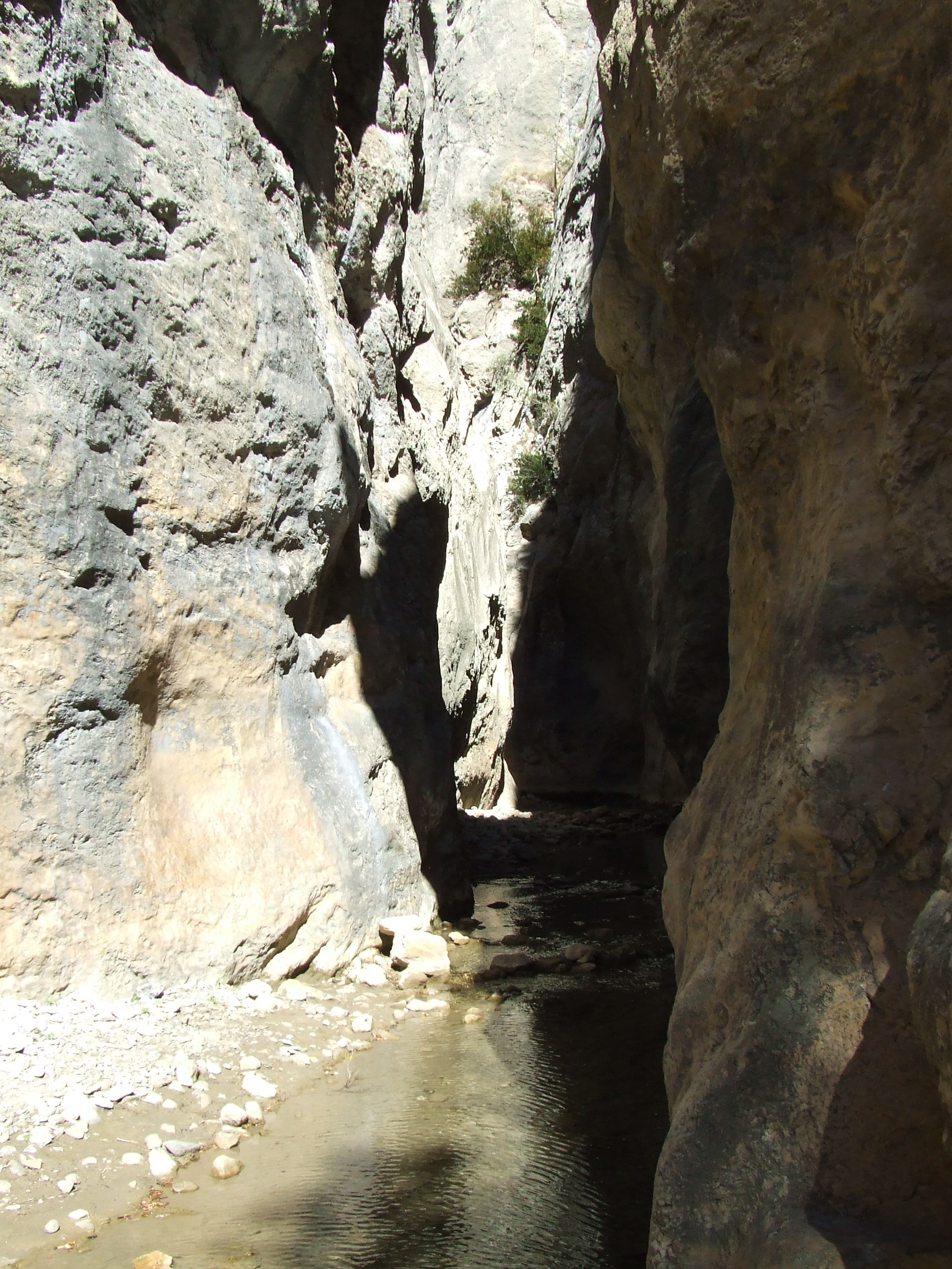 El Foradot, o Forat d'Abella (Abella de la Conca, Pallars Jussà)